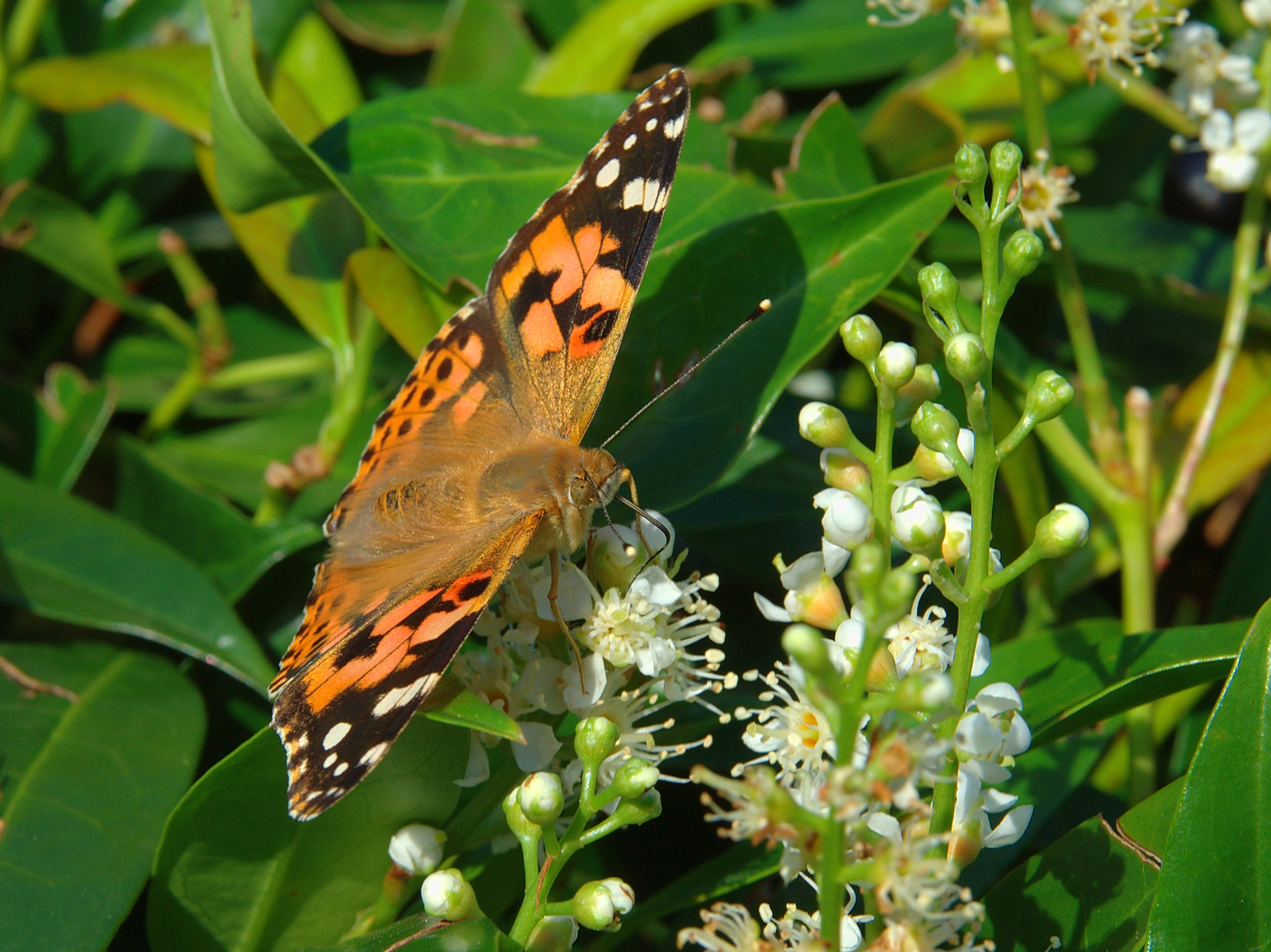 Vanessa cardui Butterfly (Belgium Hamois)